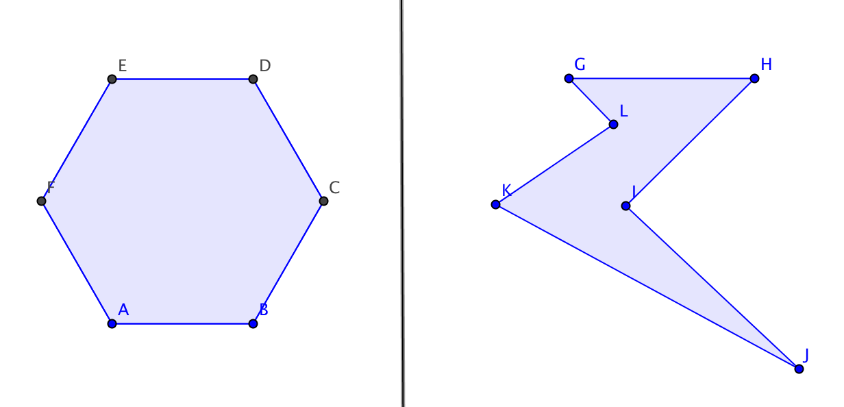 Polígonos Simples de 6 vértices